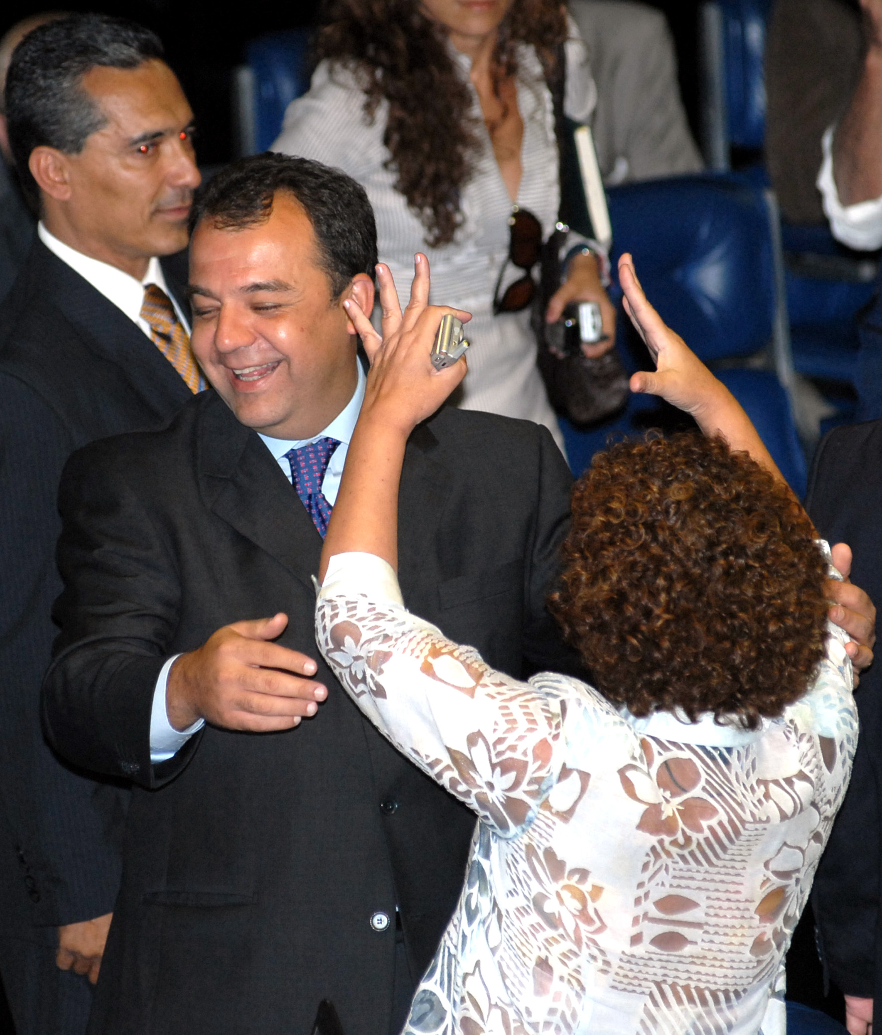 Brasília - O senador Sérgio Cabral (PMDB), governador eleito do Rio de Janeiro, durante sua última sessão no Senado, junto à colega Ideli Salvatti (PT).